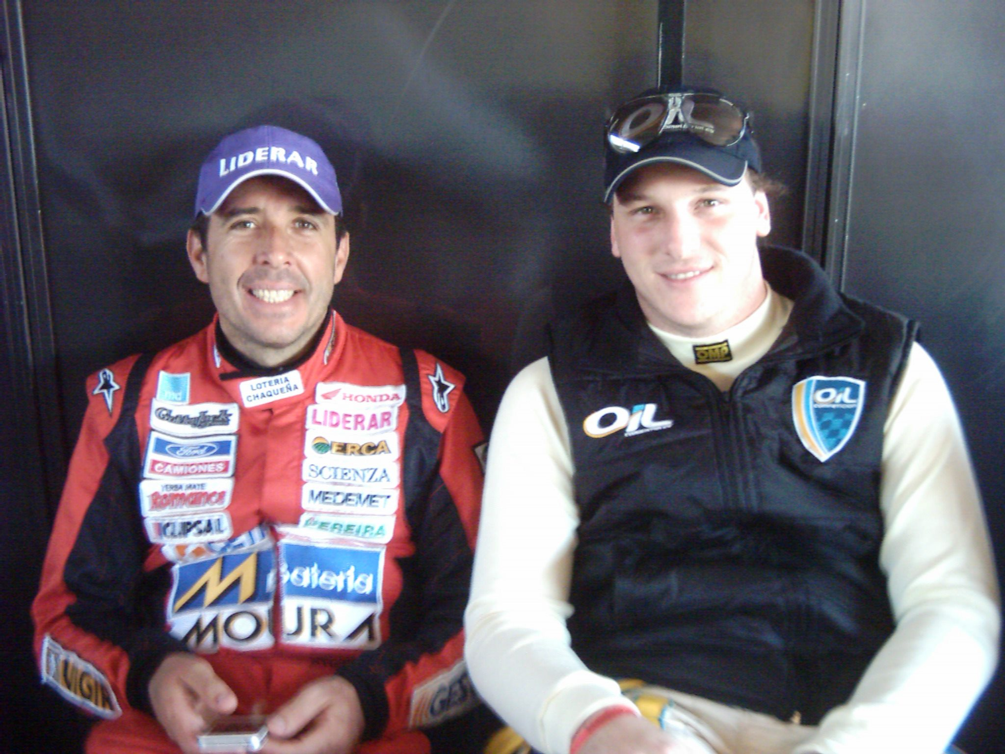 Fotografía de los pilotos Juan Manuel Silva y Guido Falaschi, tomada el 25 de septiembre de 2011, en la Ciudad de Paraná, Provincia de Entre Ríos.